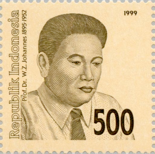 Wilhelmus Zakaria Johannes